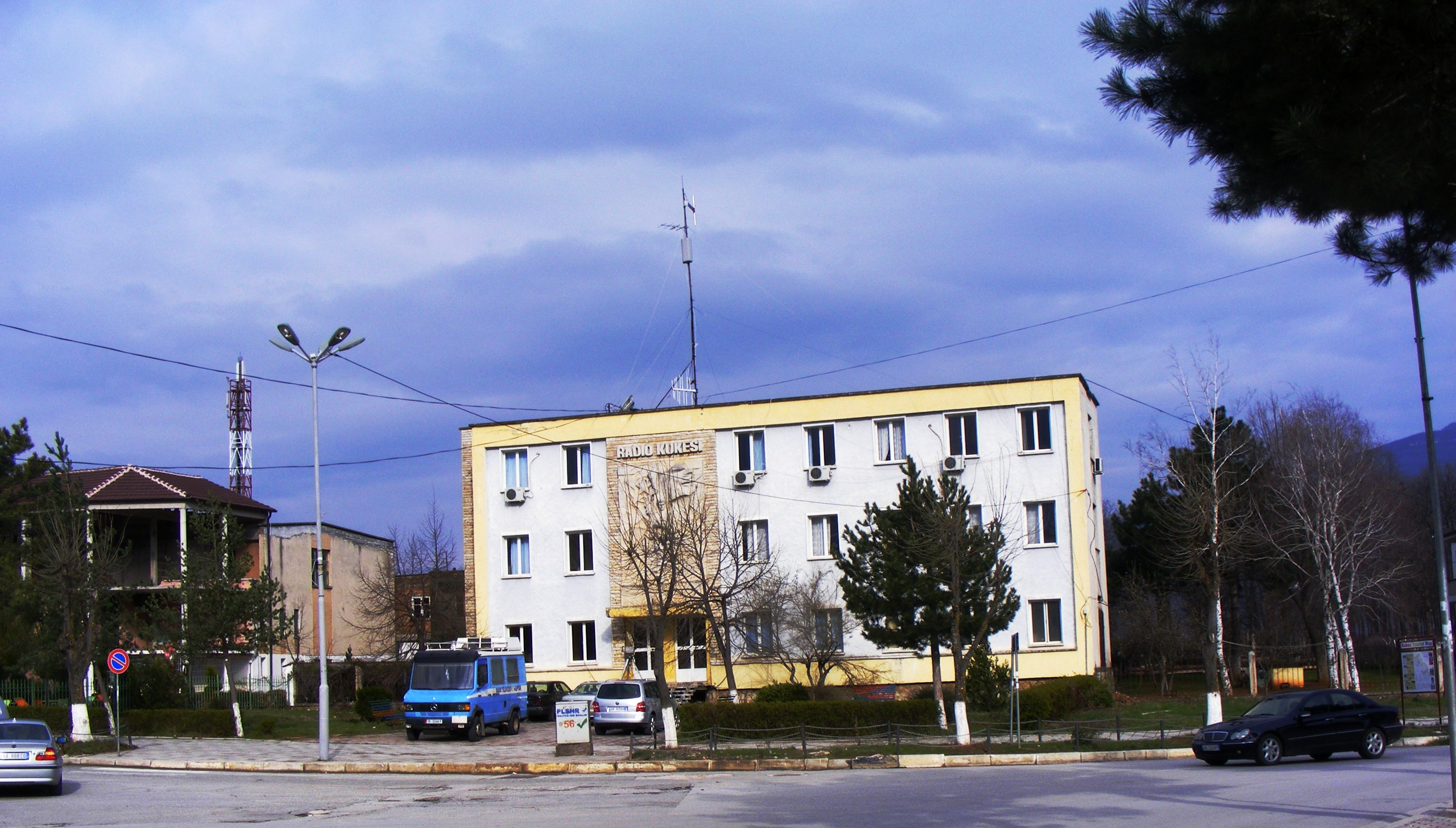 Objekti i Radio Kukësit, Kukës, Shqipëri- Albania